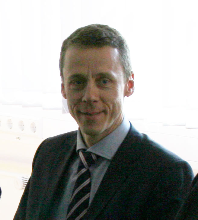 Erkki Raasuke 13. aprillil 2016 rahandusministeeriumis.